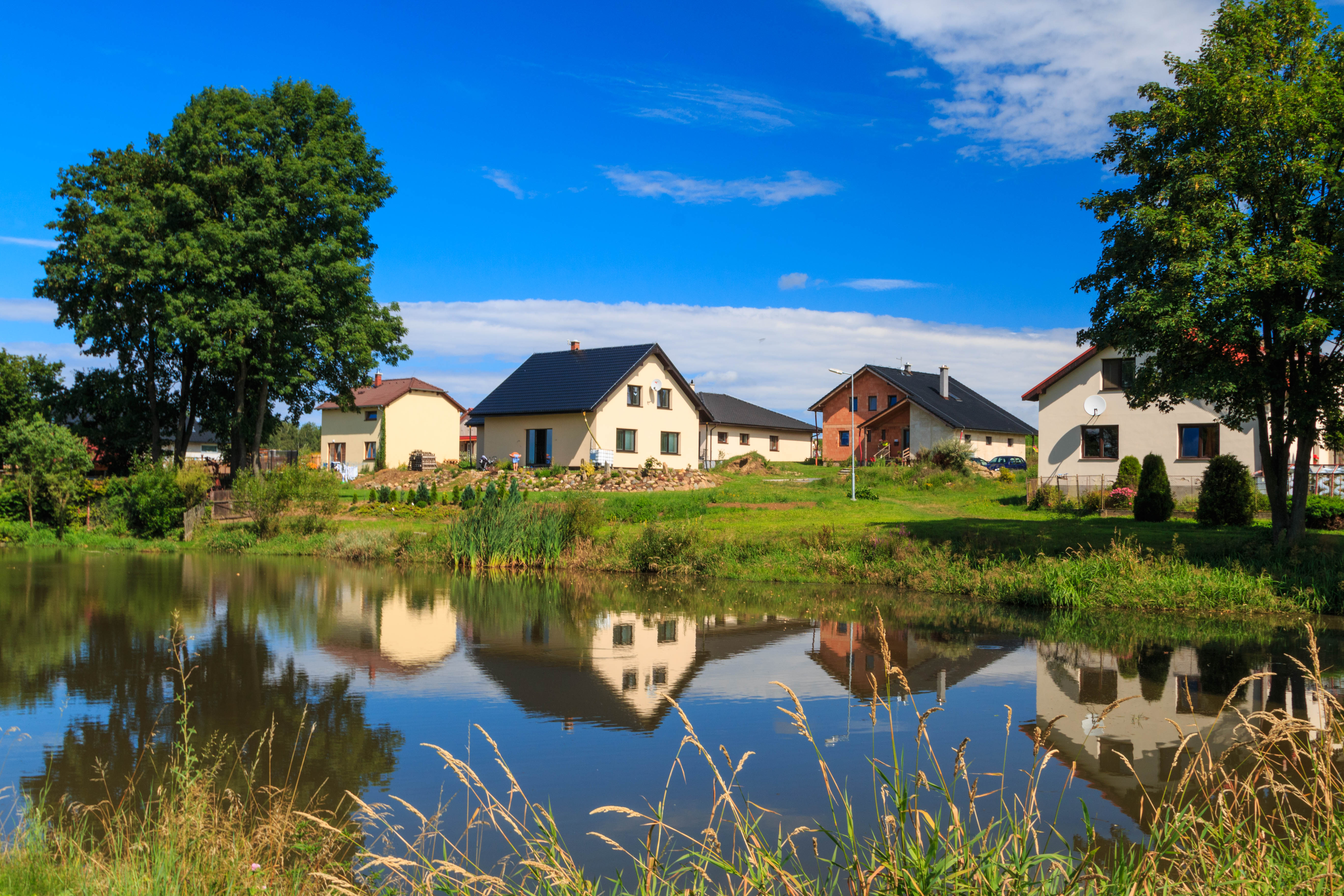 Skuhrov u Havlíčkova Brodu - rybník